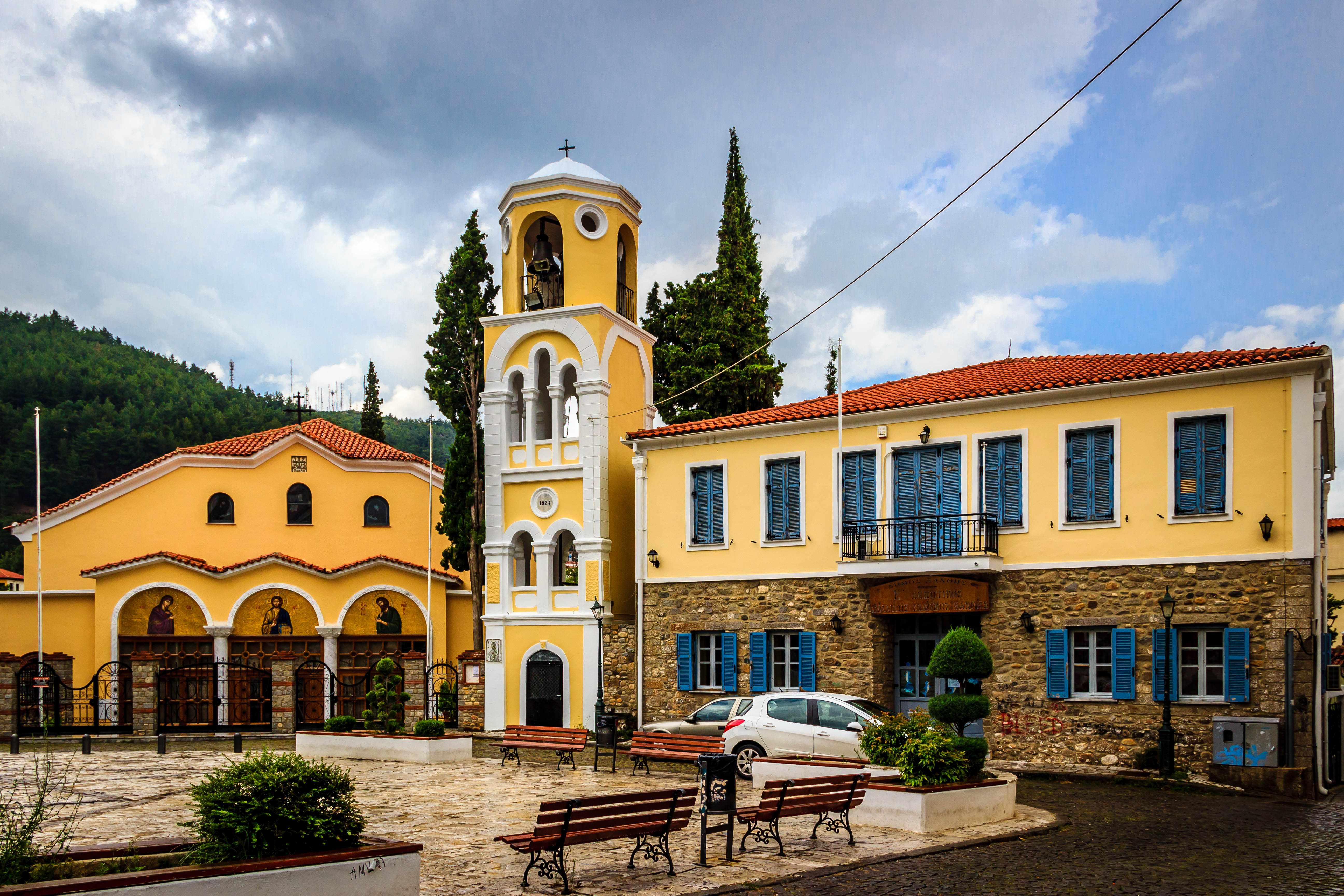 Παλαιά Πόλη Ξάνθης«Παλαιά Πόλη Ξάνθης»